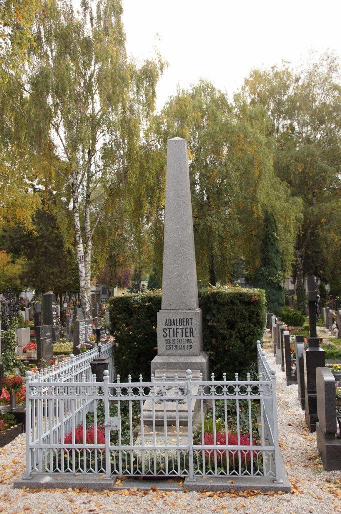 Grabstelle des Adalbert Stifter in Linz, Donau.